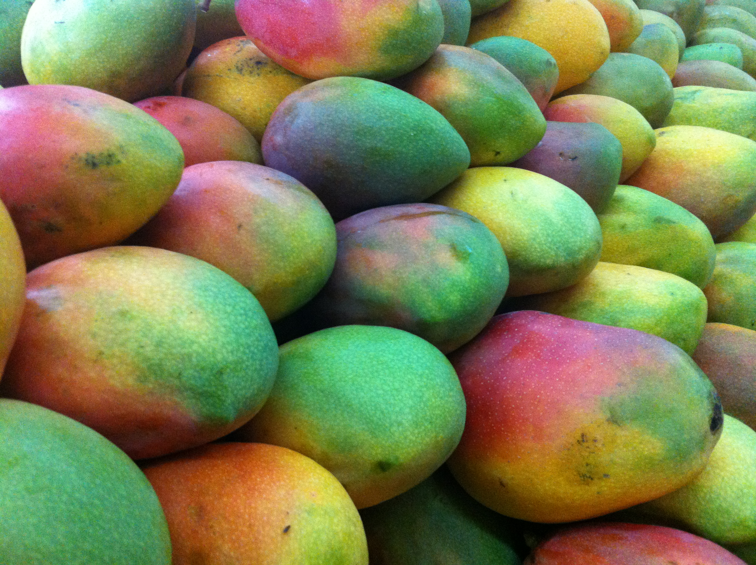 Manoes in supermarket in Florencia, Colombia